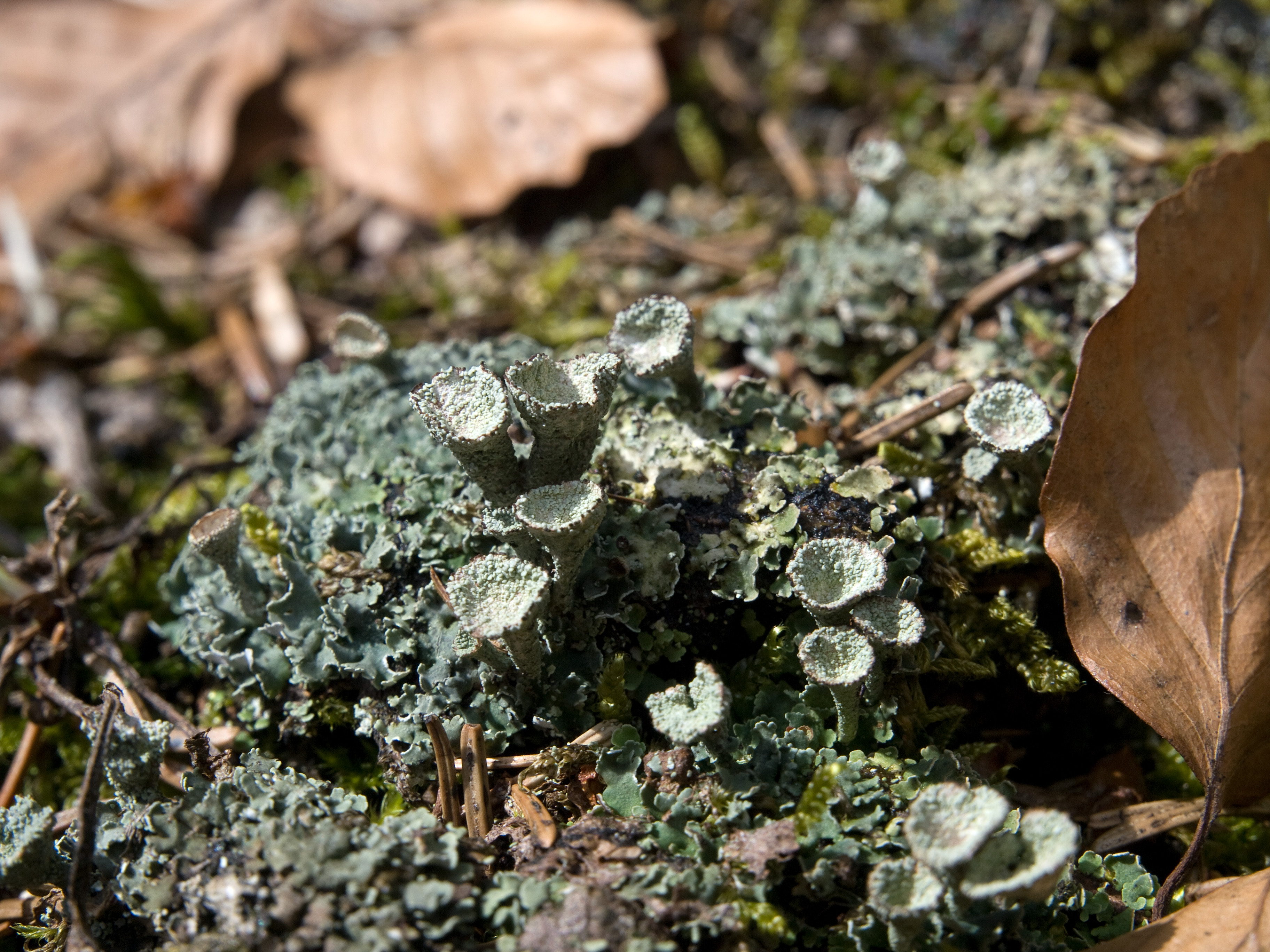 Cladonia pyxidata Picture taken in Berchtesgaden/Bavaria